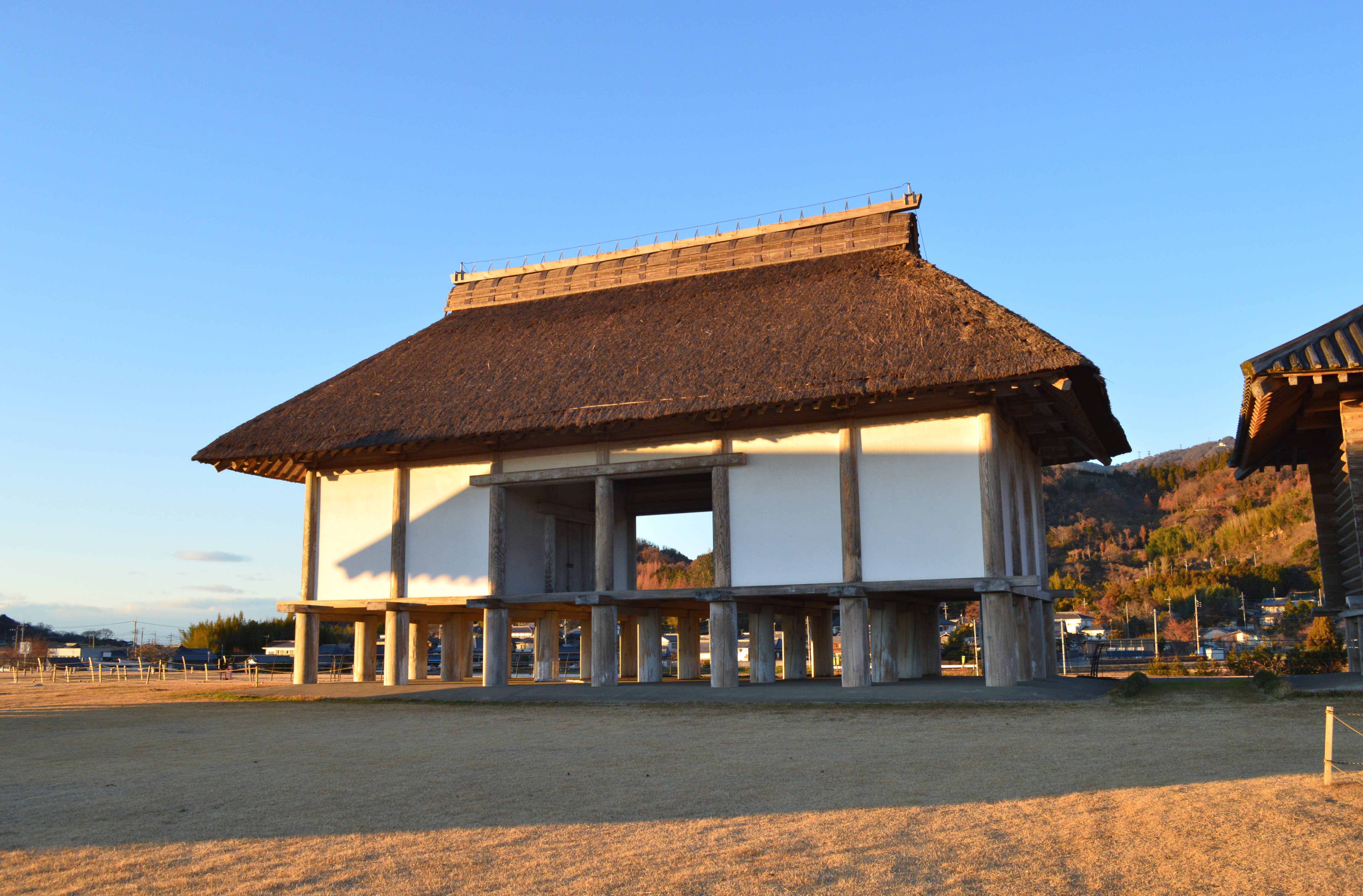 平沢官衙遺跡 土壁双倉